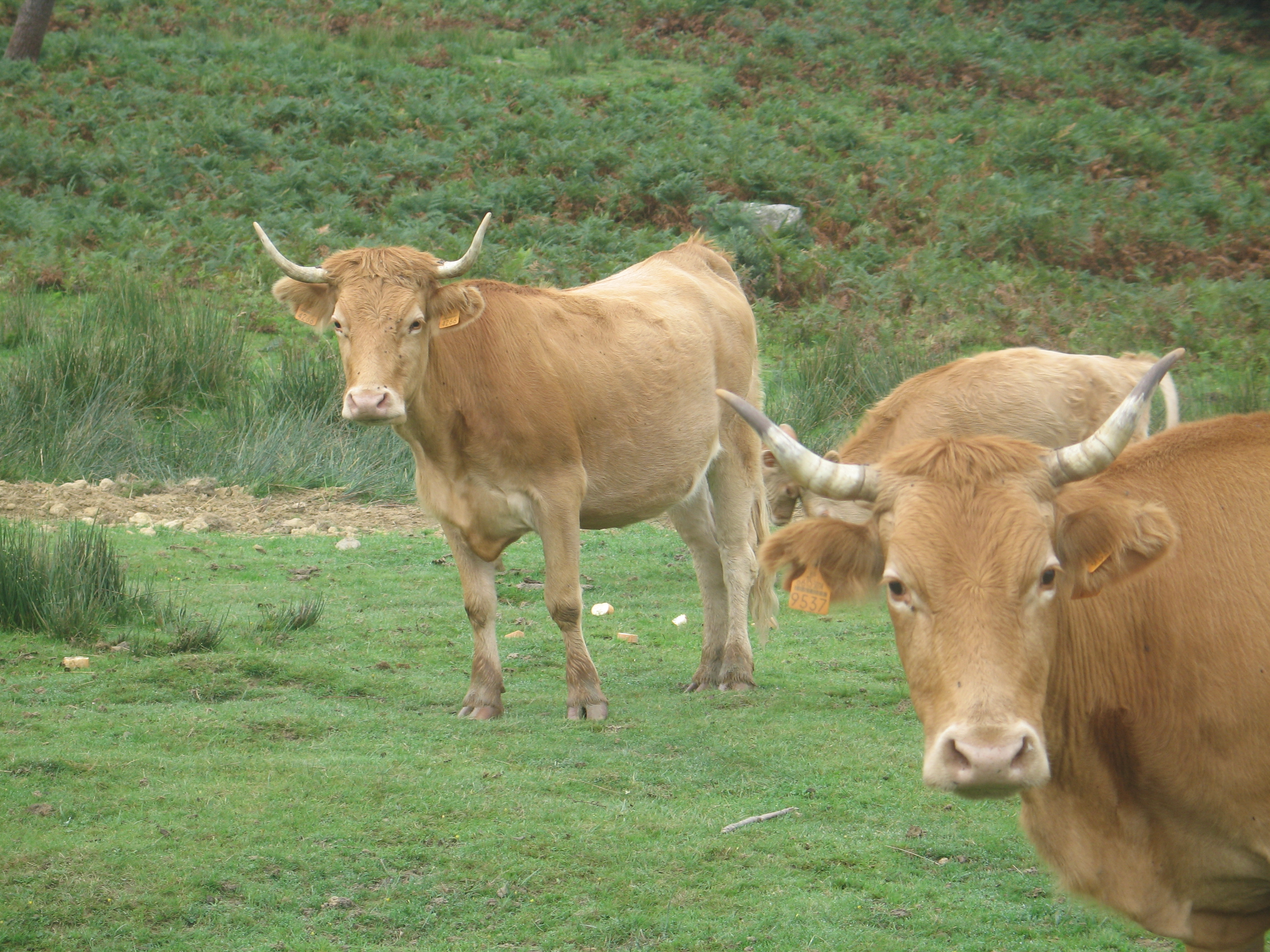 Betizuak adarra mendian